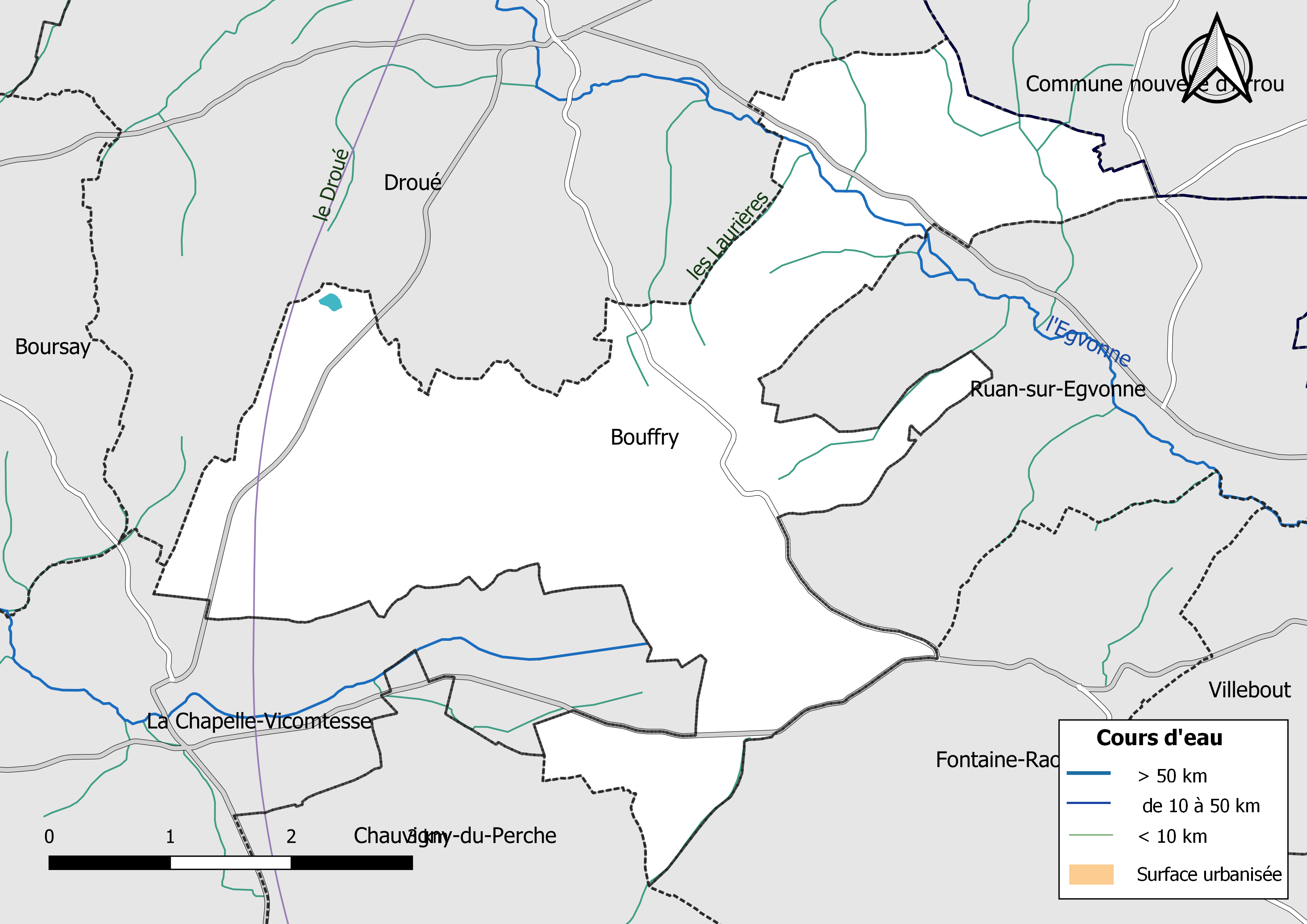 Carte du réseau hydrographique de la commune de Bouffry (France).